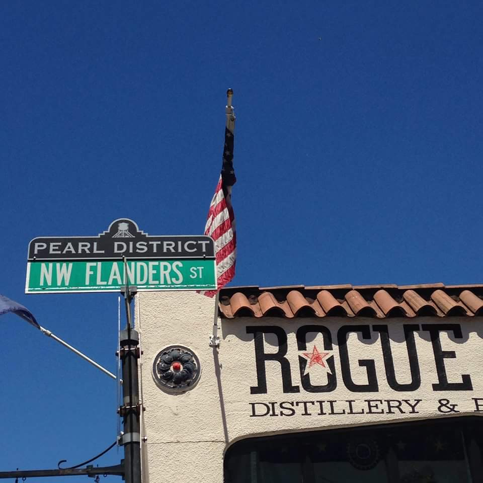 Panneau de la Flanders Street à Portland en Oregon